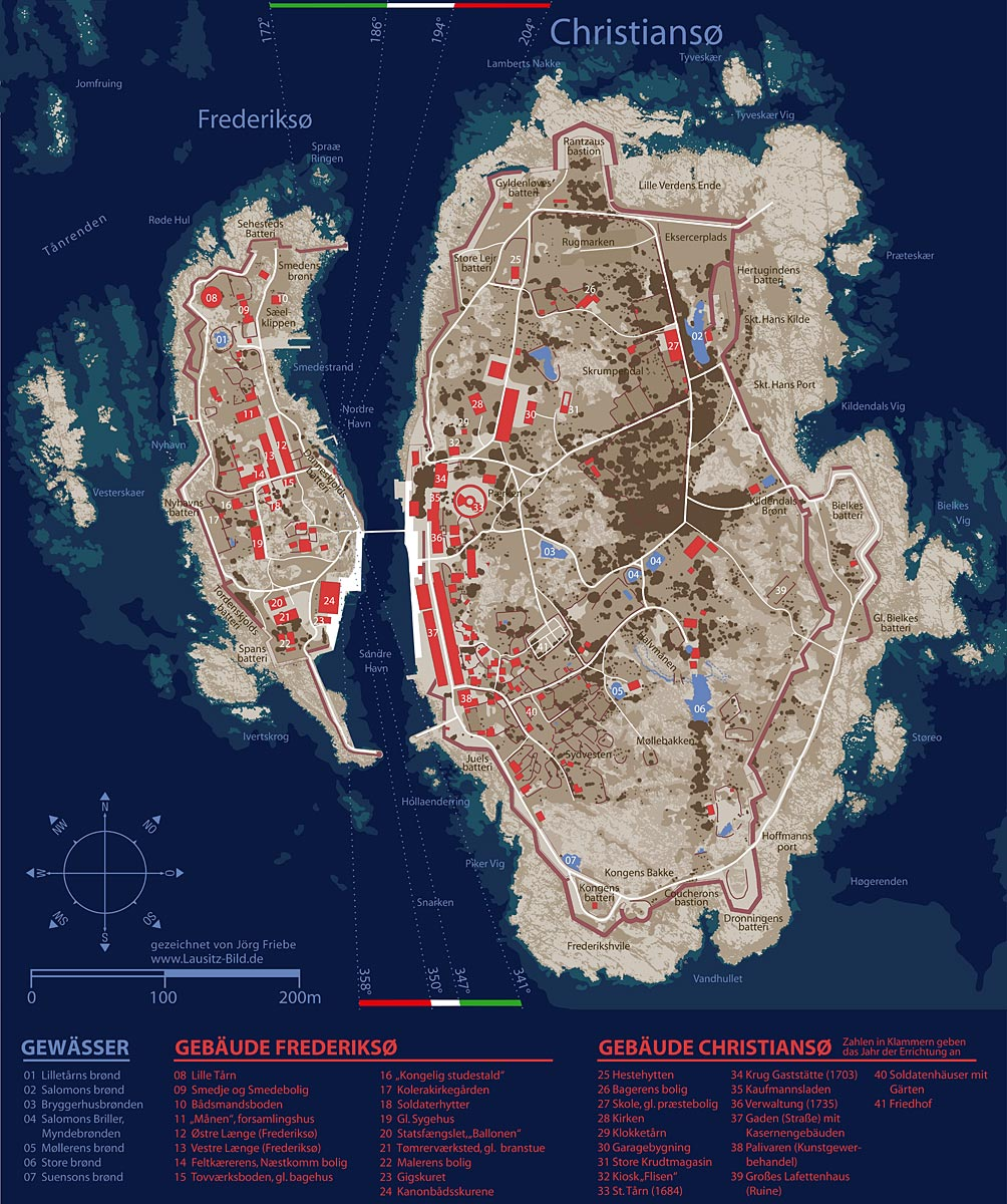 detaillierte Übersichtskarte Christiansø, Stand Sommer 2001